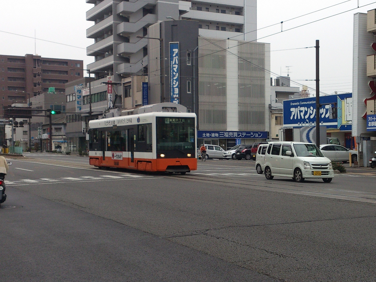 本町線の電車です